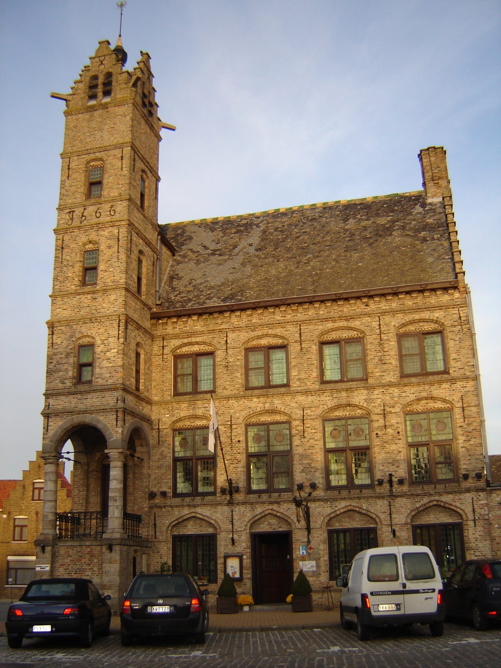 Oud stadhuis en belfort in Lo, Lo-Reninge, West-Vlaanderen. Old town hall and belfry in Lo, Lo-Reninge, West-Flanders, Belgium